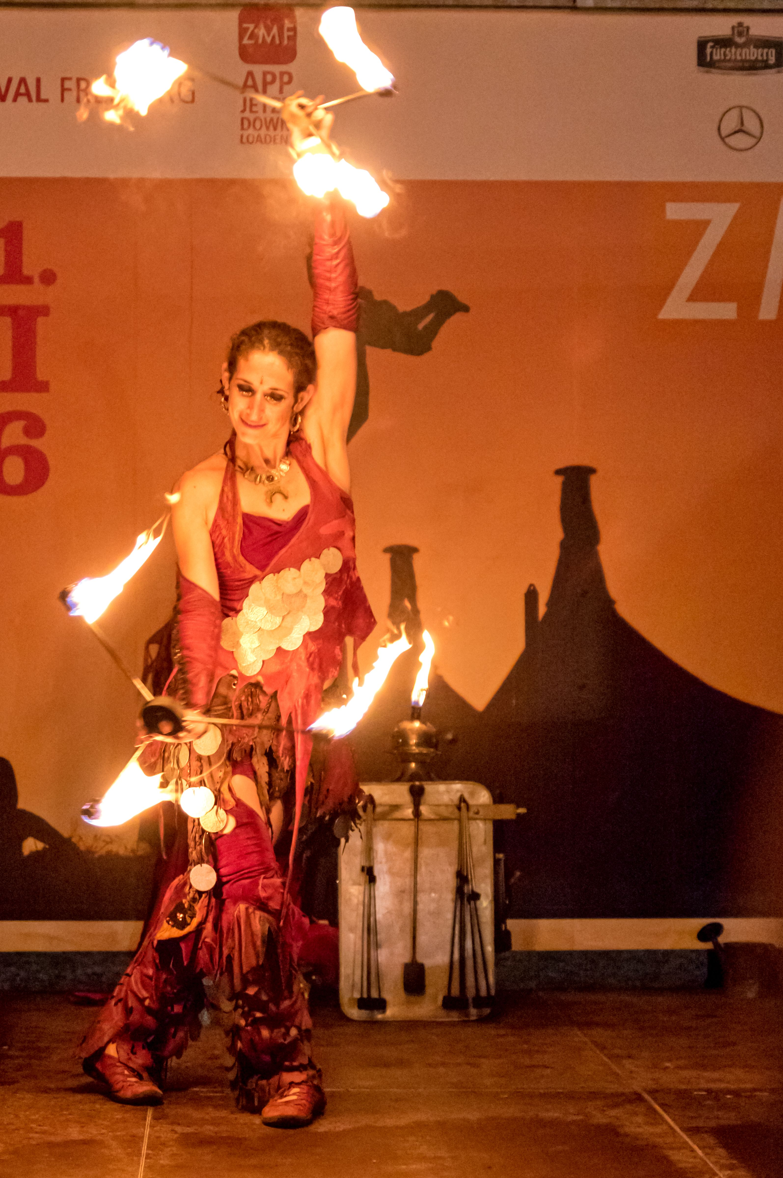 Bilder vom Zelt Musik Festival 2016 in Freiburg im Breisgau Kleinkunst auf dem Fest Fire Fingers